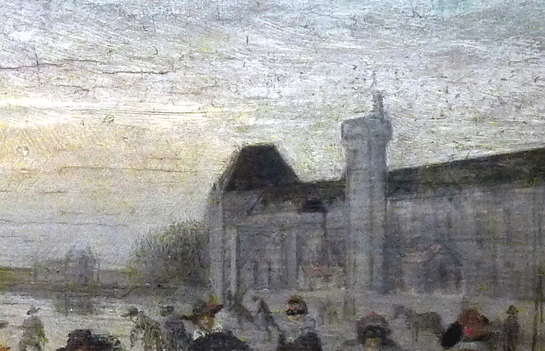 Détail d'un tableau représentant une scène de la vie quotidienne des parisiens pendant l’hiver de 1607-1608, appelé le « Grand Hiver », qui dura de la mi-décembre 1607 à la mi-mars 1608 et au cours duquel la Seine fut gelée pendant plusieurs semaines. Dans cette partie du tableau figure la tour du bois de l’enceinte de Charles V. Derrière cette dernière apparaît la grande galerie construite à la fin du XVIe siècle.